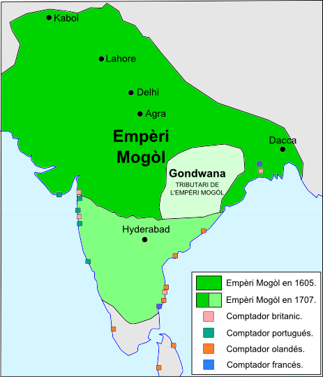 Empèri Mogòl au sègle XVII.